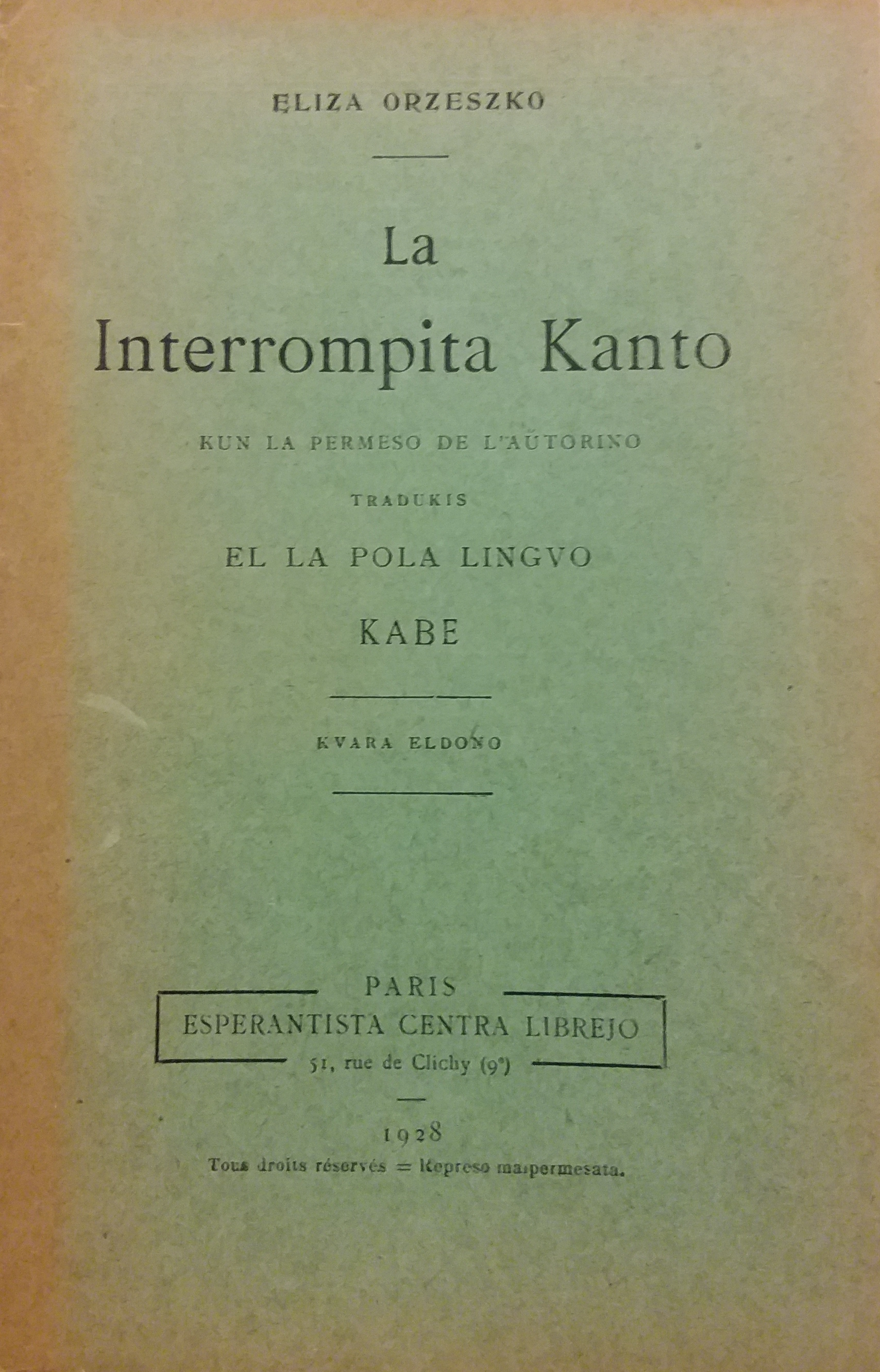 librokovrilo de libro "La Interompita Kanto", 1928